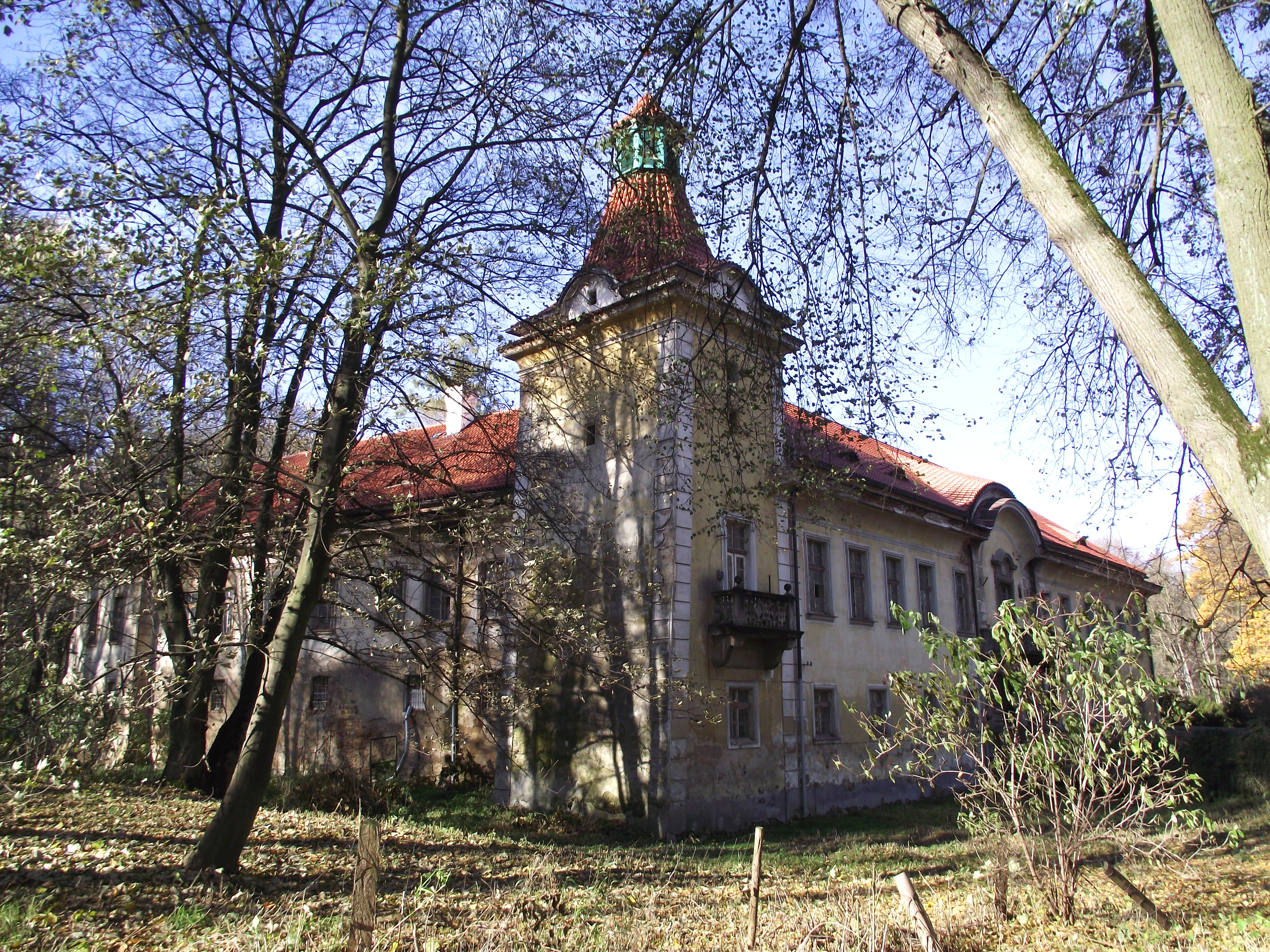 Zámek Lukavec, okres Pelhřimov